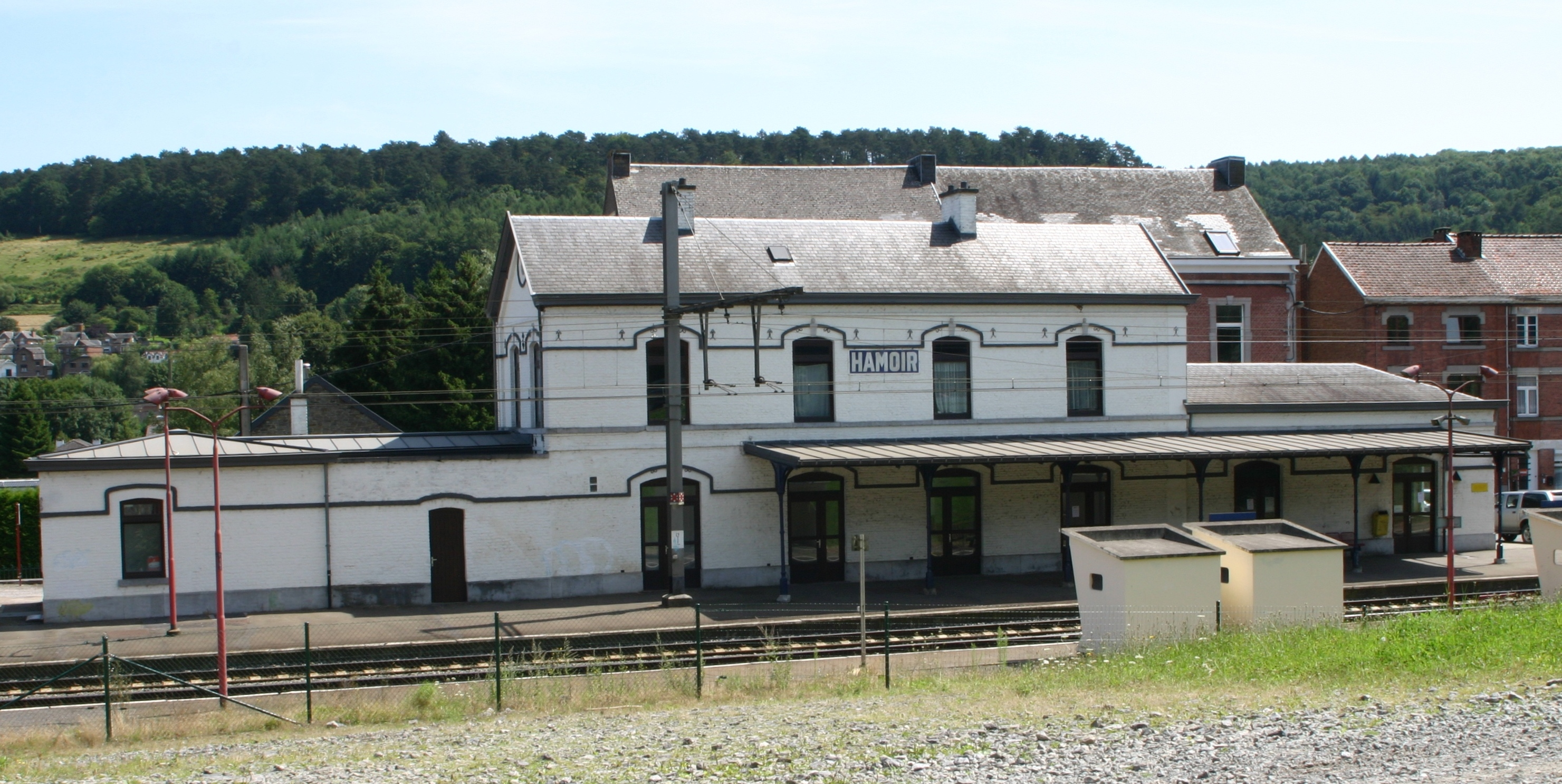 Gare vun Hamoir. Kategorie:Garen an der Belsch